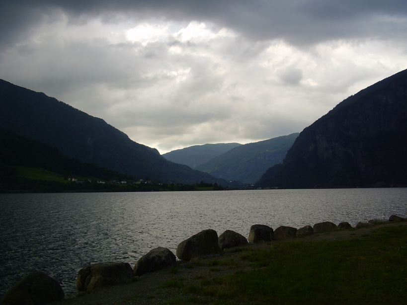 Bilde tatt ved Granvinsvatnet i Granvin herad. Det bryggar opp til regn.